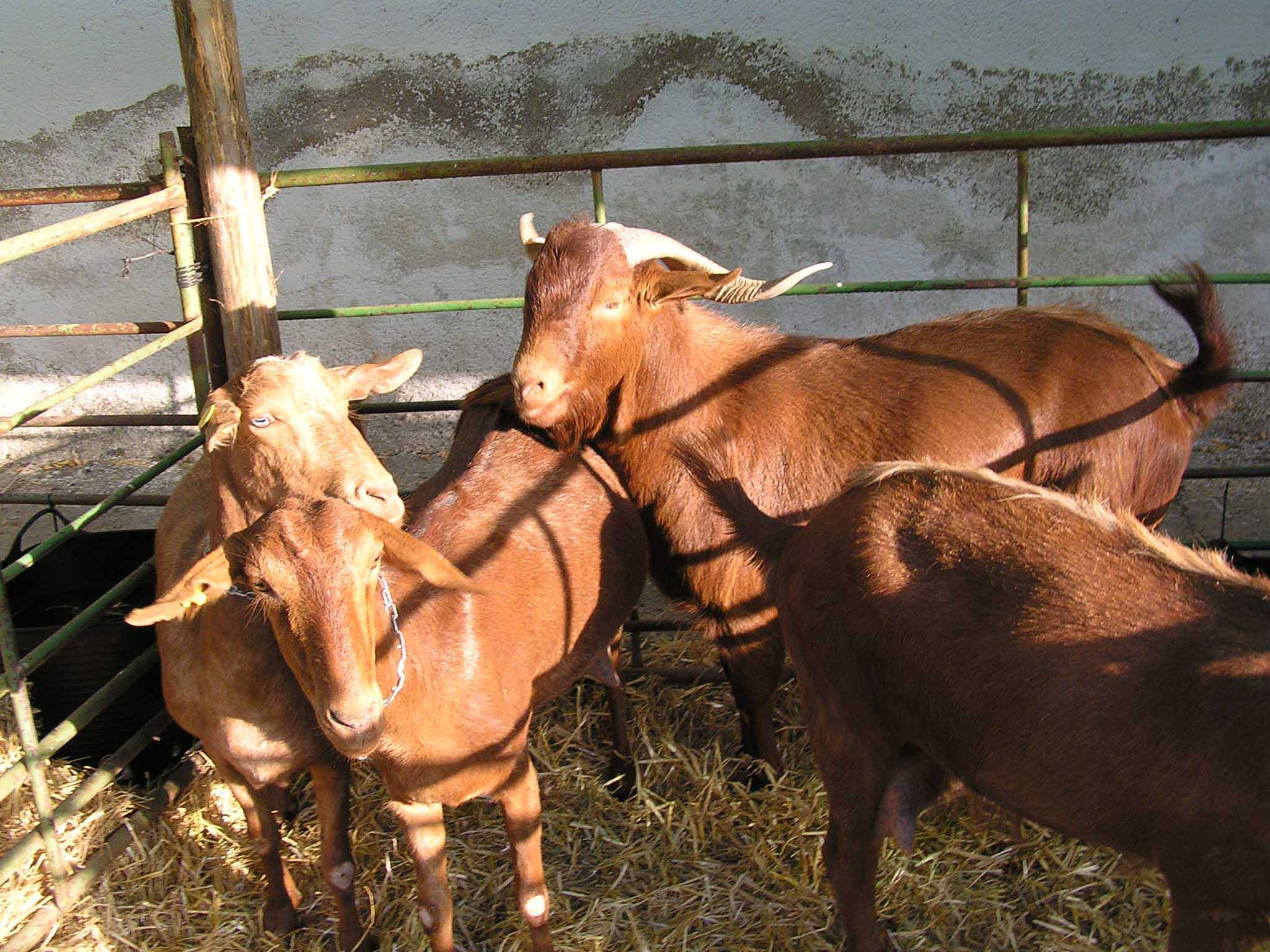 Cabras rubias en un corral en Alcalá la Real, (Andalucía, España).